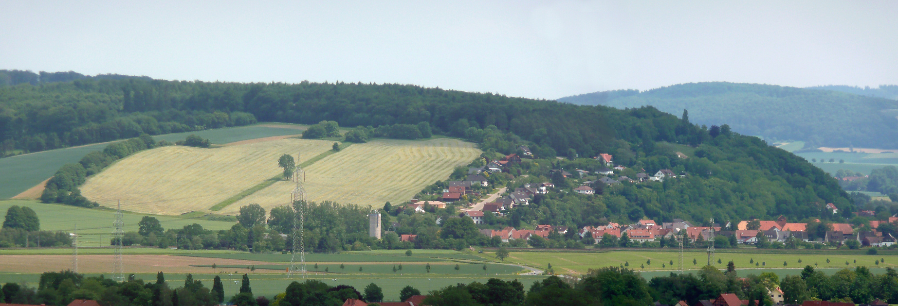 Bückeberg